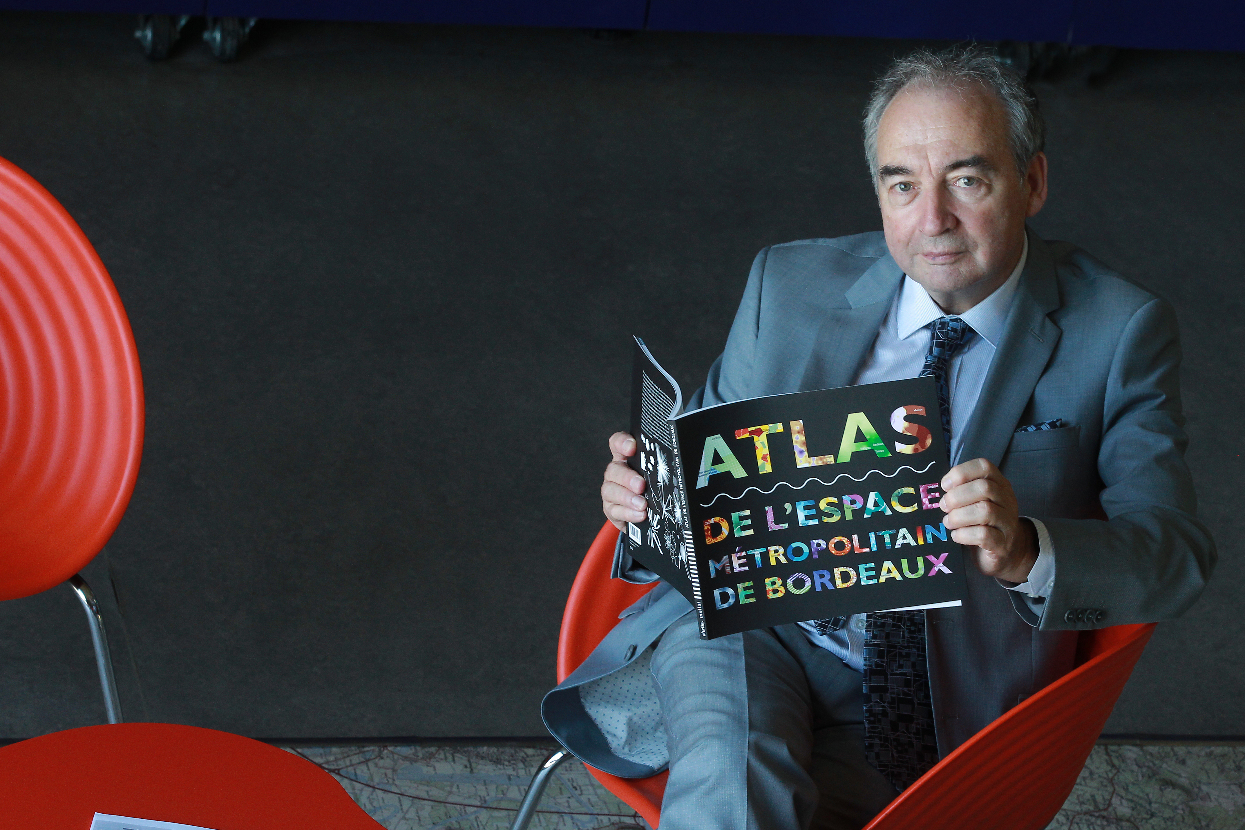 photo: Fabien Cottereau